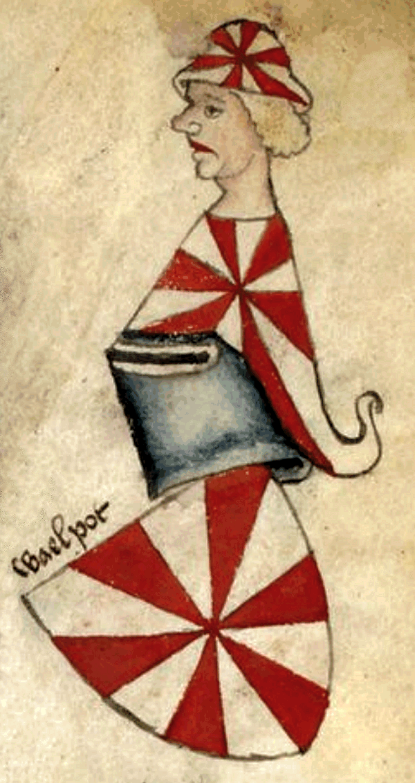 Wappen der Walpod („Waelpot“) von Waltmannshausen, eines Stammes mit den Waldbott von Bassenheim, eines rheinischen Adelsgeschlechts, das erstmals 1136 urkundlich erwähnt wird mit den Brüdern Siegfriedus Gebhardus und Fridericus de Waltmaneshusen. Ab 1267 war die Familie im Besitz des Walpodenamtes der Grafen von Diez.